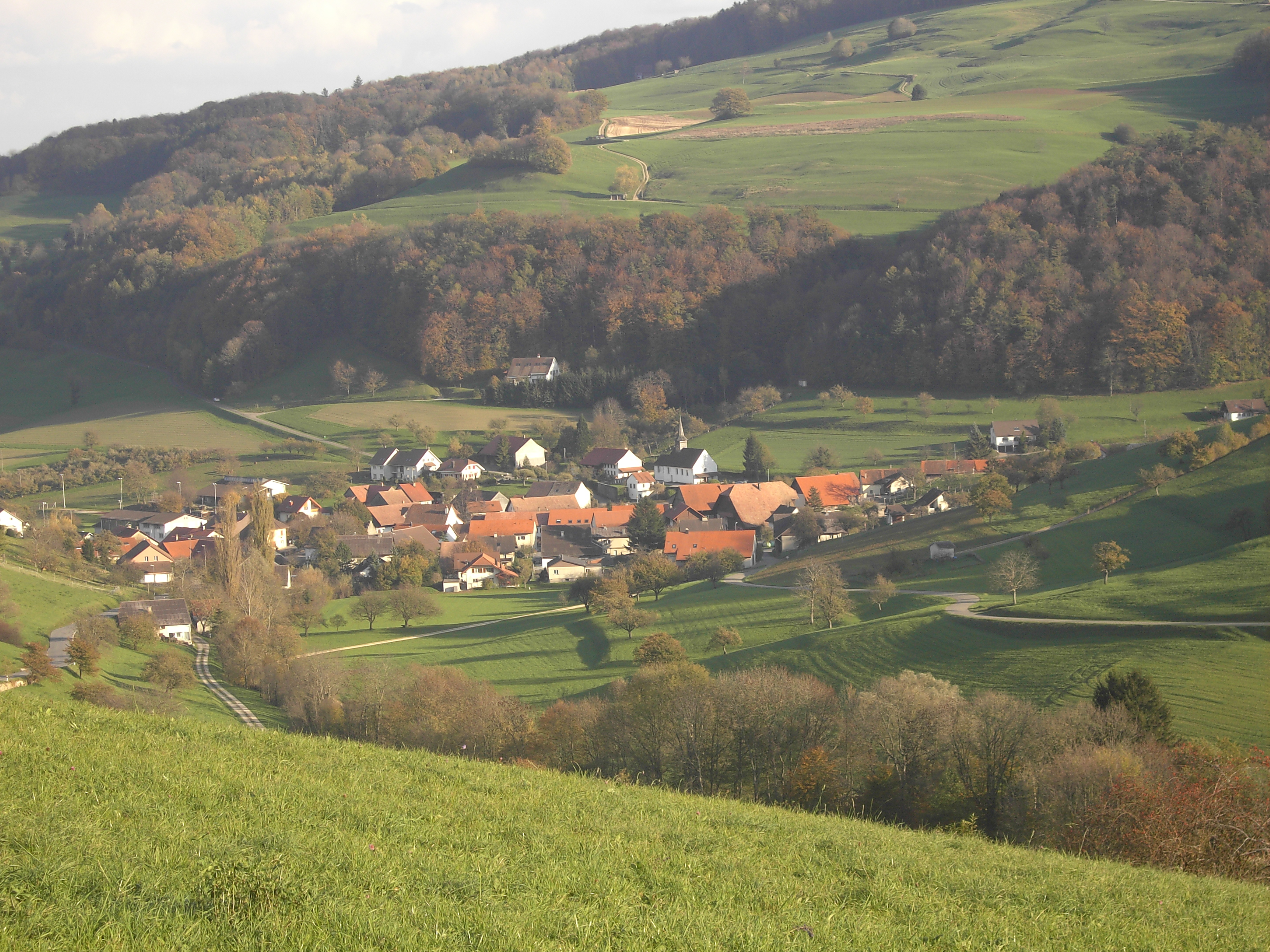 Thalheim in Switzerland